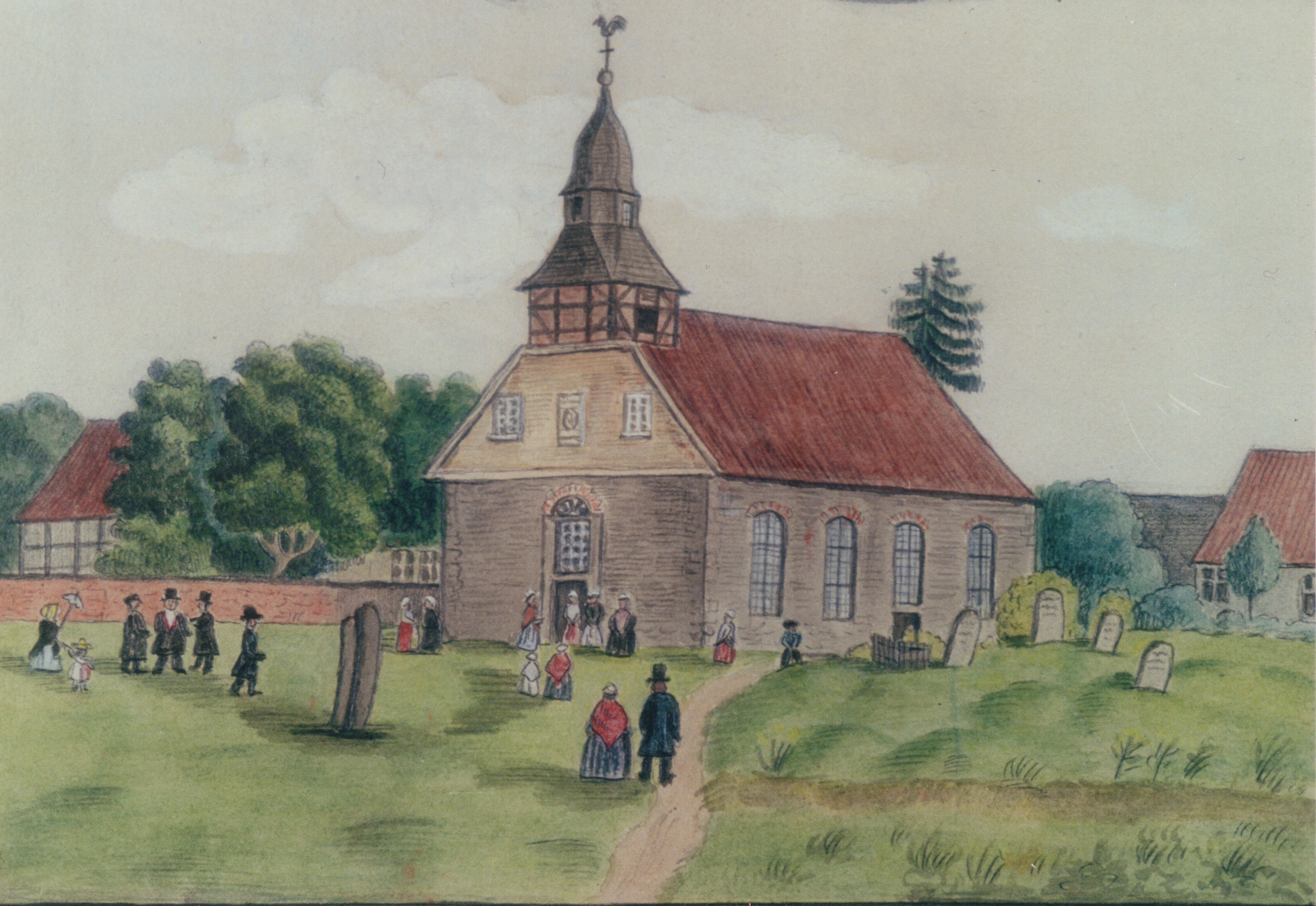 Wagenfelder Kirche 1850 oder 1860